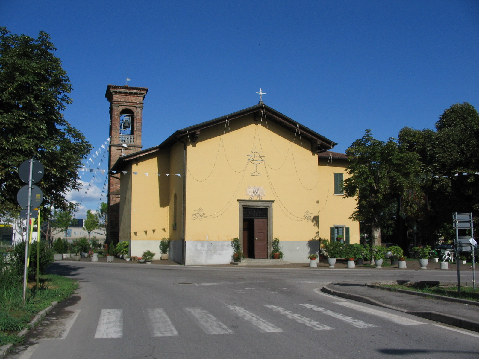 Osio Sopra, Santuario Madonna della Scopa